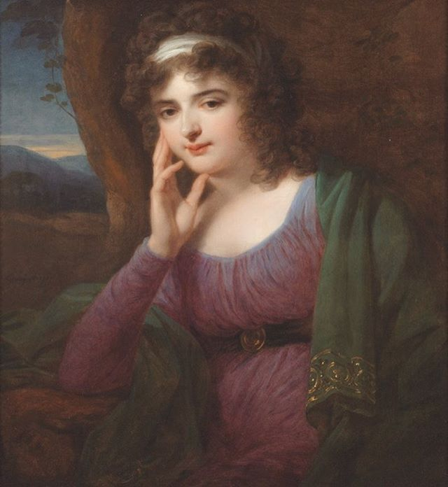 Eleonora Sörgel von Sorgentha geborene Gräfin von Seeau († 1810), Öl auf Leinwand, 81 x 62 cm